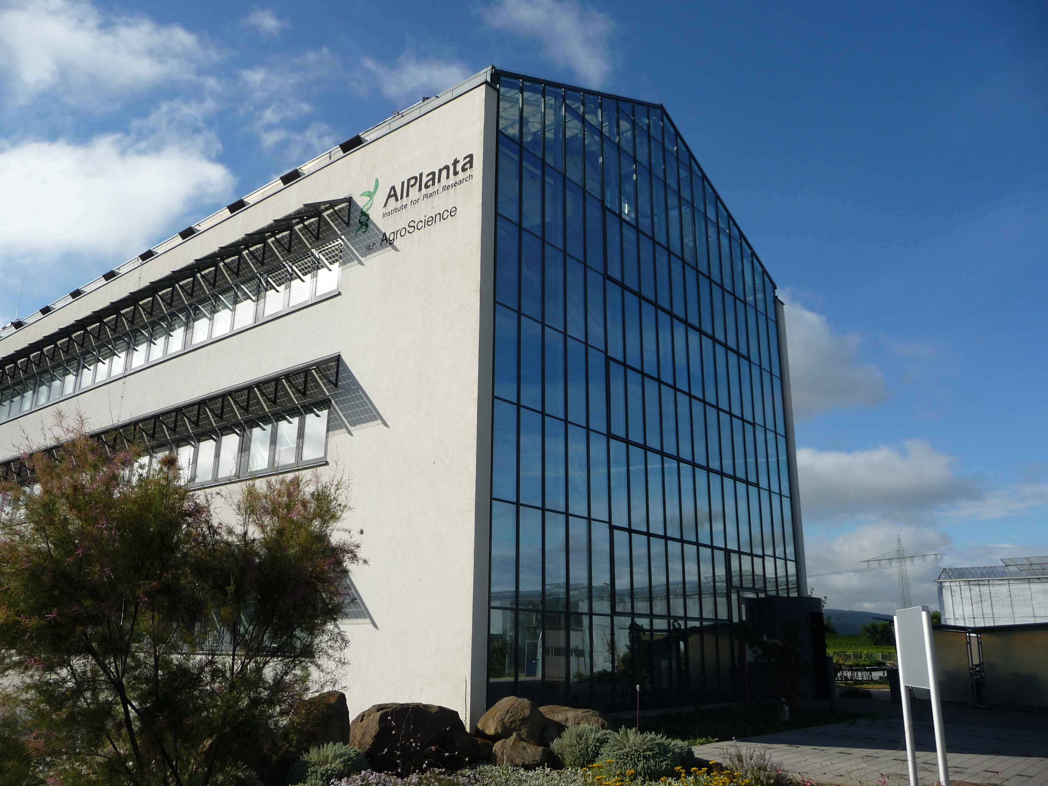 Dienstleistungszentrum Ländlicher Raum, früher Forschungsanstalt für Weinbau und Gartenbau bei Neustadt an der Weinstraße